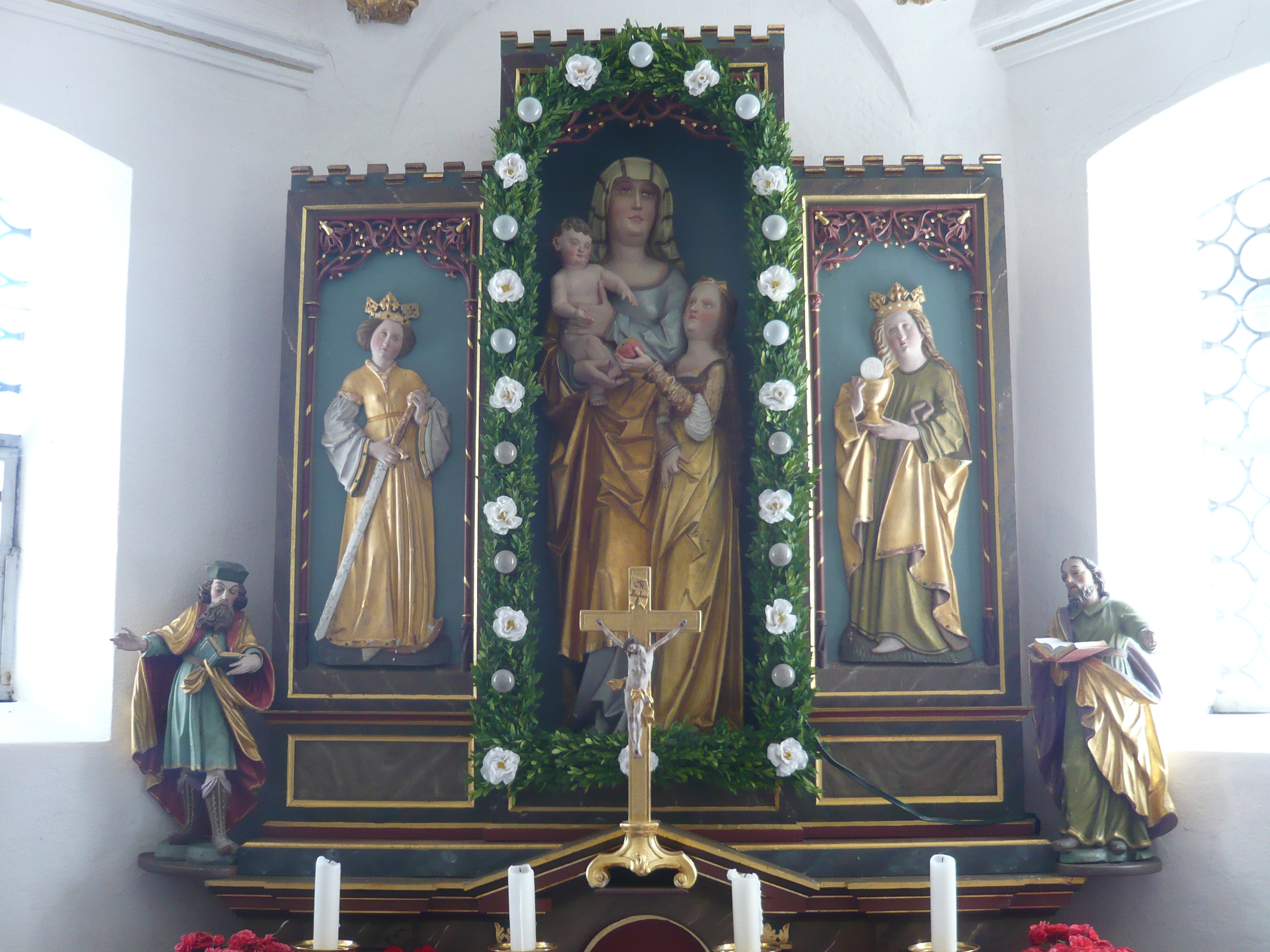 Altar der Kapelle St. Anna in Pfronten-Rehbichel